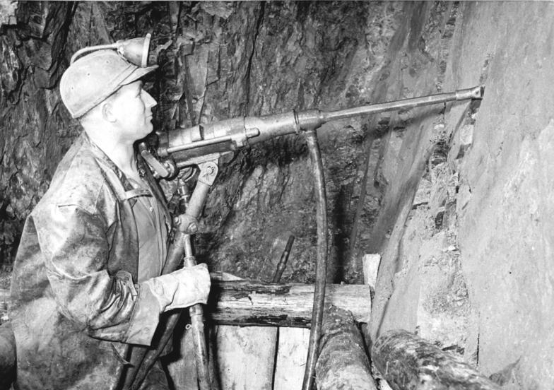 Bergarbeiter mit Bohrmaschine Zentralbild Schlegel Ws-Qu 2328.1.-V. 28.11.1957 27.11.1957 Industriezweig Wismut erfüllte den Jahresplan der Grundproduktion Das Kollektiv der SDAG Wismut hat am 22. November den Grundproduktionsplan für 1957 erfüllt. Die Kumpel, Techniker und Angestellten erfüllten damit eine im Wettbewerb zu Ehren des 40. Jahrestages der Großen Sozialistischen Oktoberrevolution übernommene Verpflichtung, das Jahresziel bis zum 5. Dezember zu erreichen., 13 Tage früher. Sie haben sich das Ziel gesetzt, bis zum 22.12 einen weiteren Monatsplan zu erfüllen. Wesentlichen Anteil an dem guten Ergebnis hatte das Objekt Oberschlema. Die Belegschaften der zum Objekt gehörenden Schächte realisierten als erste ihre Jahresauflage in der Grundproduktion bereits am 27. September. Zu den besten im ganzen Objekt Oberschlema gehört die Jugendbrigade "Deutsch-Sowjetische-Freundschaft", deren Leiter Johannes Pfeiffer, am Tag der Republik mit dem Titel "Held der Arbeit" ausgezeichnet wurde. Die Bergarbeiter hatten schon am 24. Juli ihre Jahresauflage geschafft. UBz: "Held der Arbeit" Johannes Pfeiffer, beim Bohren eines Sprengloches.